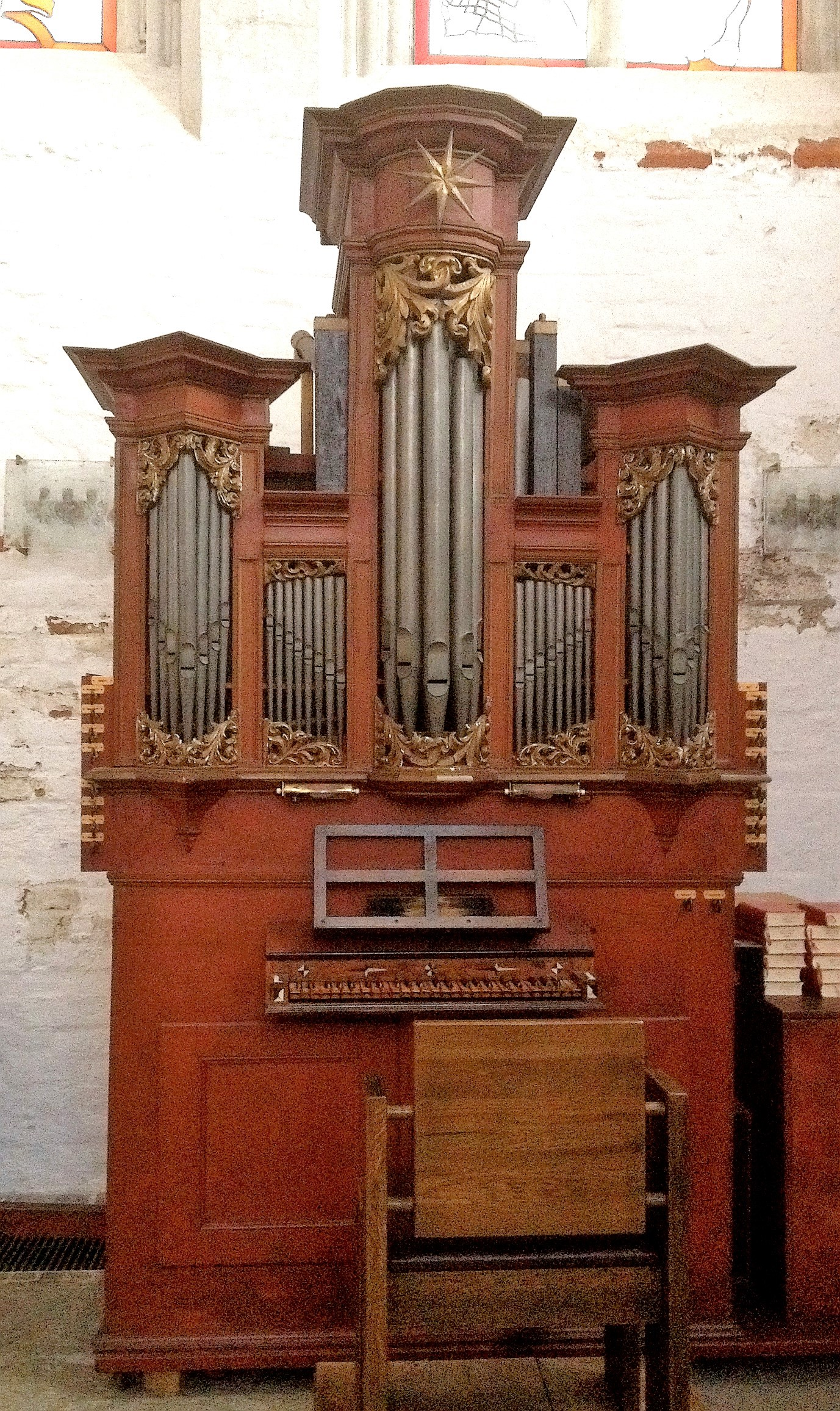 Orgel in der Briefkapelle der Marienkirche in Lübeck